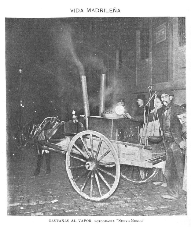 Castañas al vapor. Fotografía de Nuevo Mundo